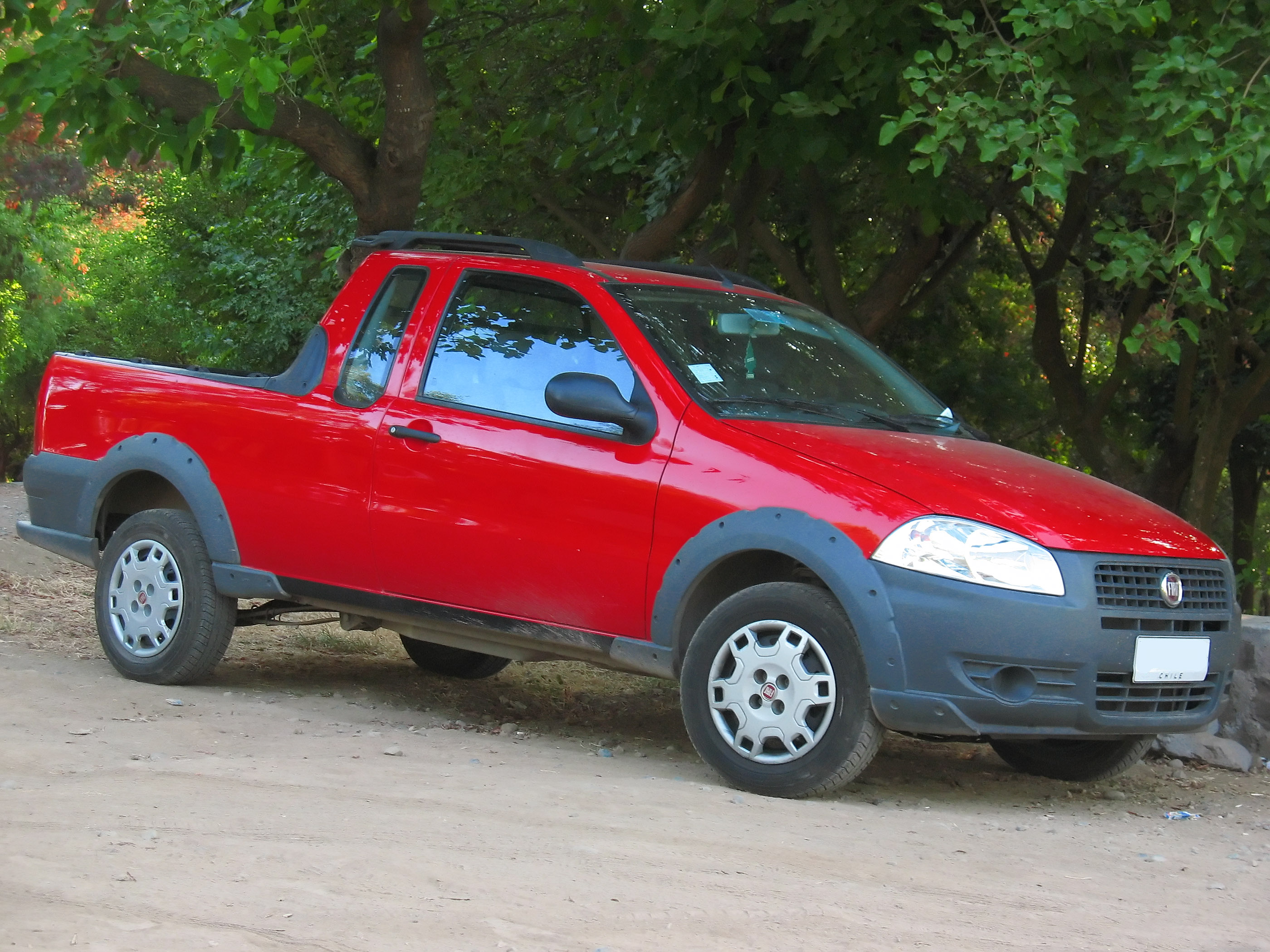 Fiat Strada 1.4 Working 2012